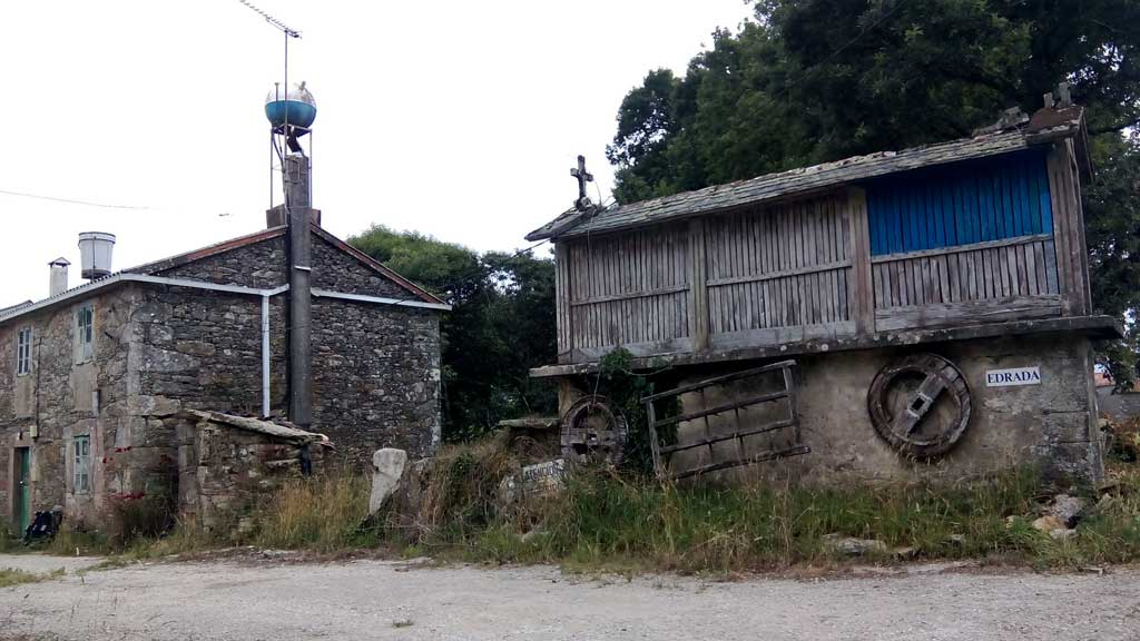 Vista da Edrada, Curtis.